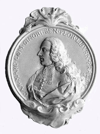 Bassorilievo ovale con il ritratto del marchese Carlo Ginori. Ginori a Doccia, 1745 c.